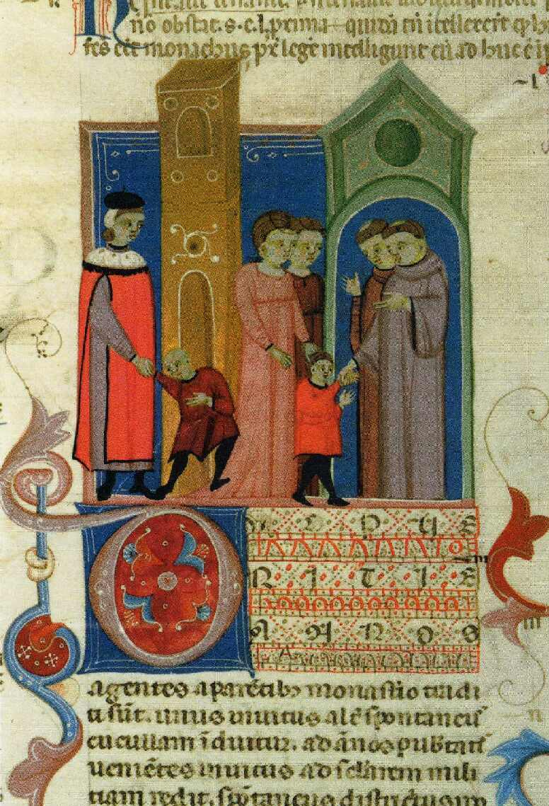 Kinder werden als Schüler einem Kloster übergeben. Illustration in einer Handschrift des Decretum Gratiani